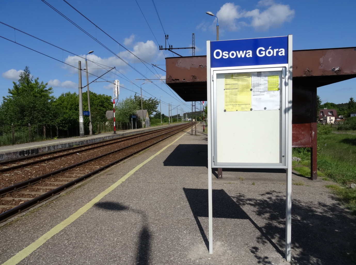 Przystanek kolejowy Osowa Góra w Bydgoszczy